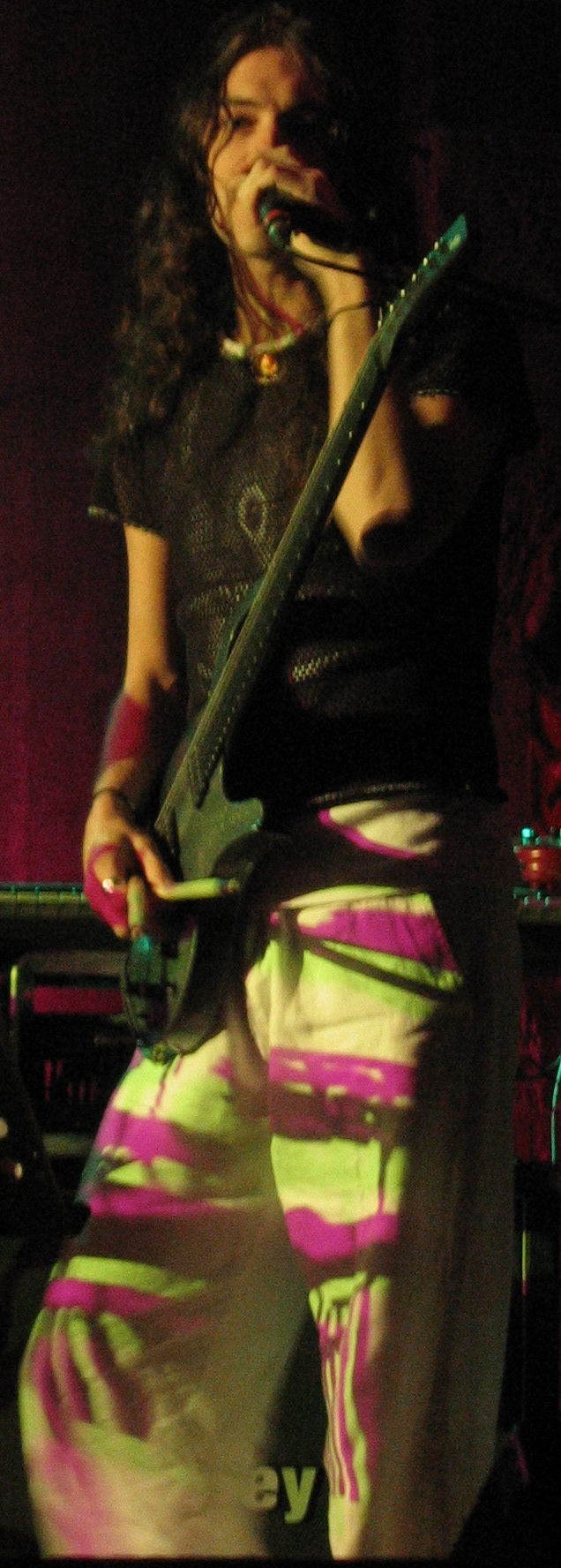 Daniel Gildenlöw im Herbst 2004